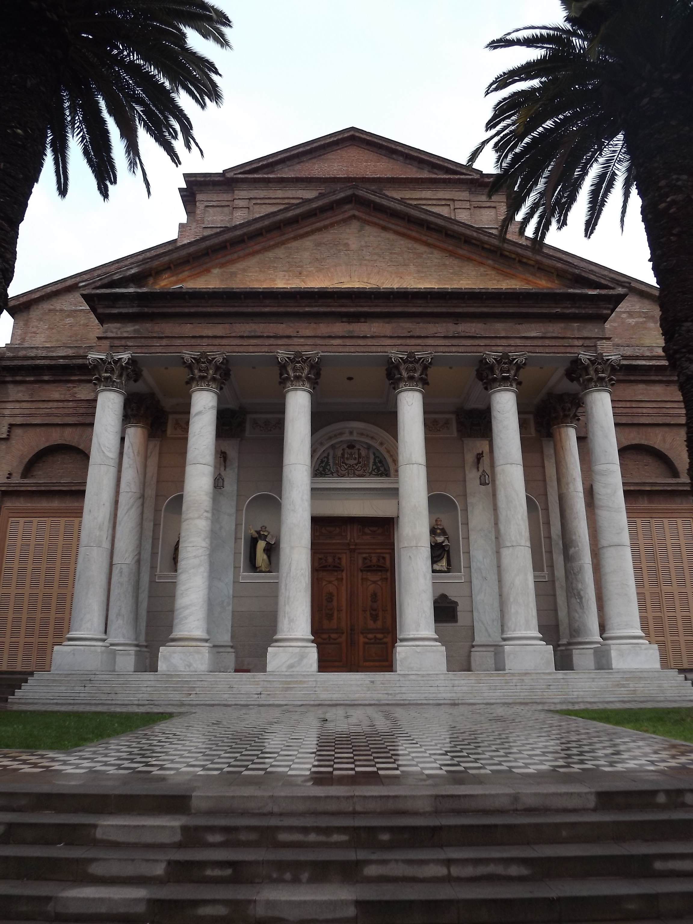 Acceso principal a la Iglesia. This is a photo of a national monument in Chile: 229